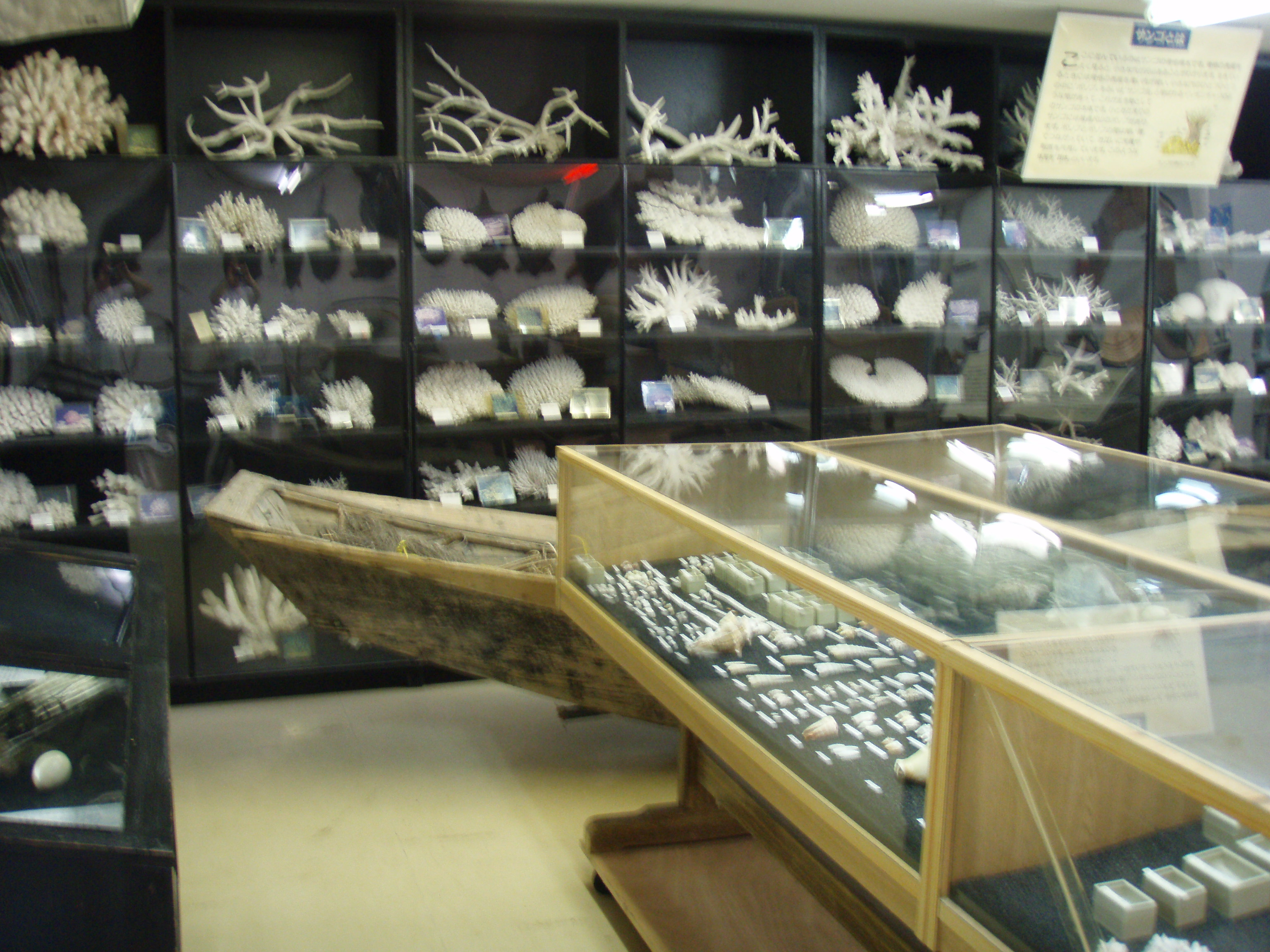 collection exibition room